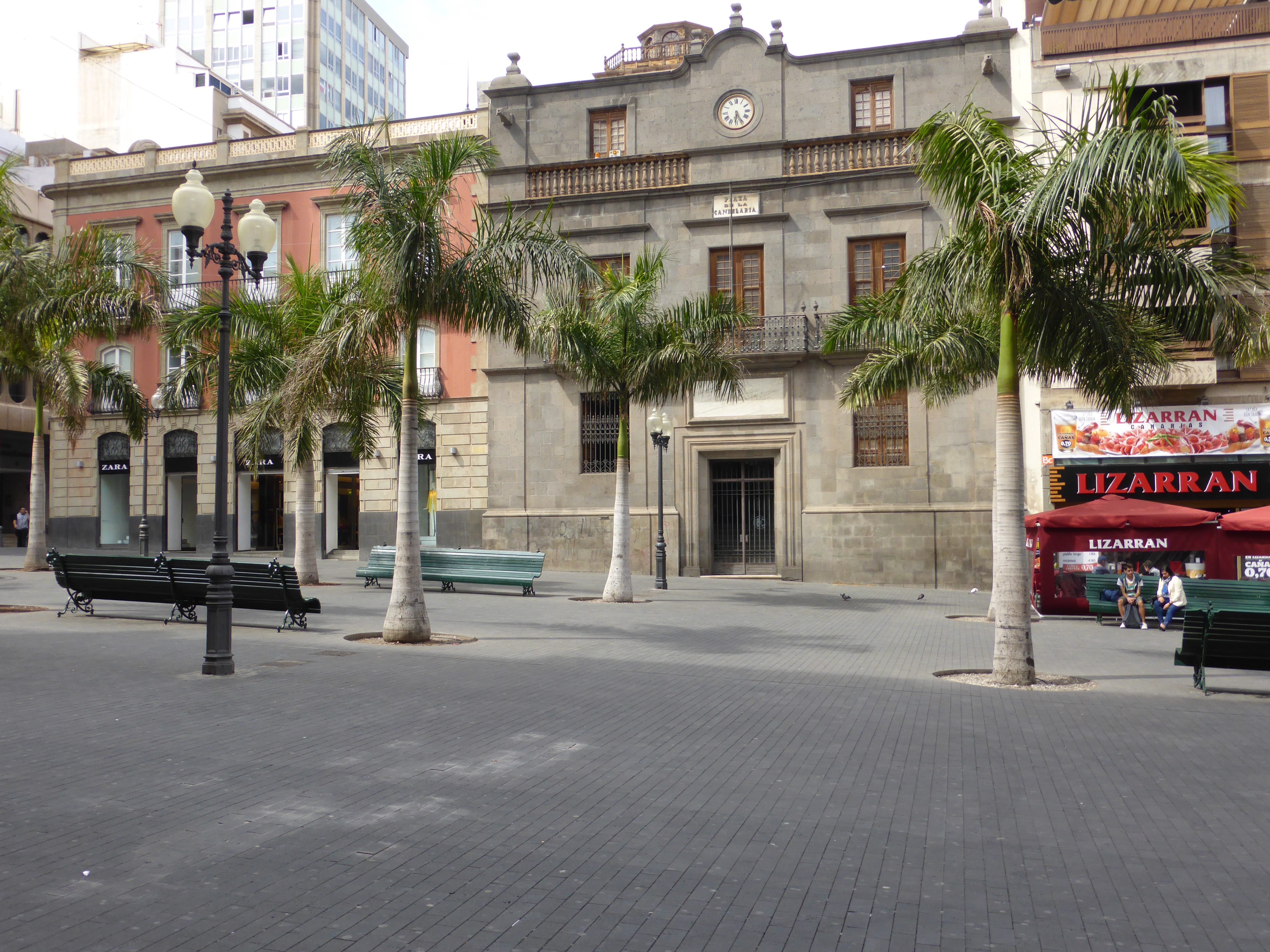 Palacio de Carta, del año 1752 (siglo XVIII), en la Plaza de la Candelaria, de la ciudad de Santa Cruz de Tenerife.